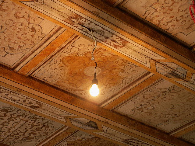 Kasettendecke]im Schloss Schönfeld bei Dresden/Weißig; "Klassik und Moderne"